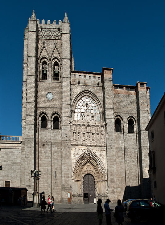 Catedral de Ávila.